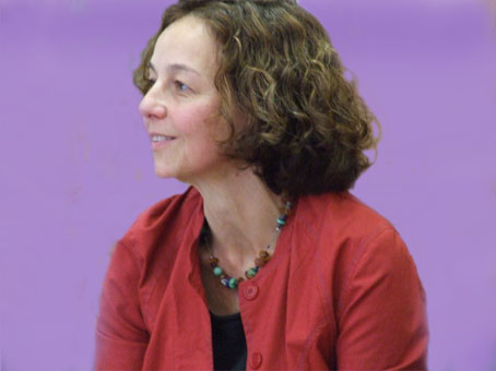 תמונה של ניבה אלקין קורן